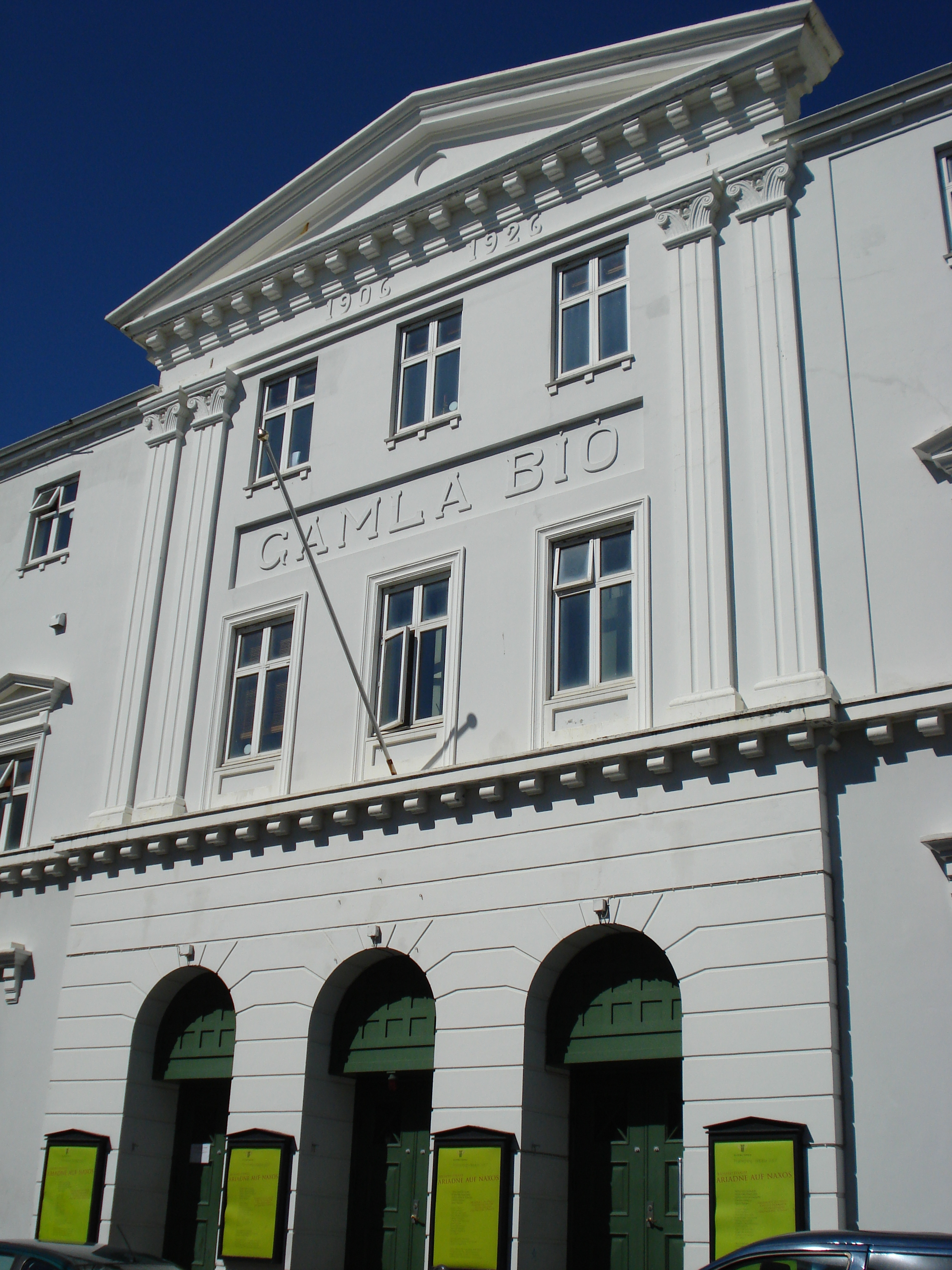 Gamla Bíó, ÍslenskaÓperan, National Opera, Reykjavik